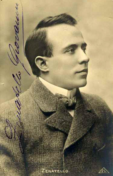 Photo of italian opera singer Giovanni Zenatello